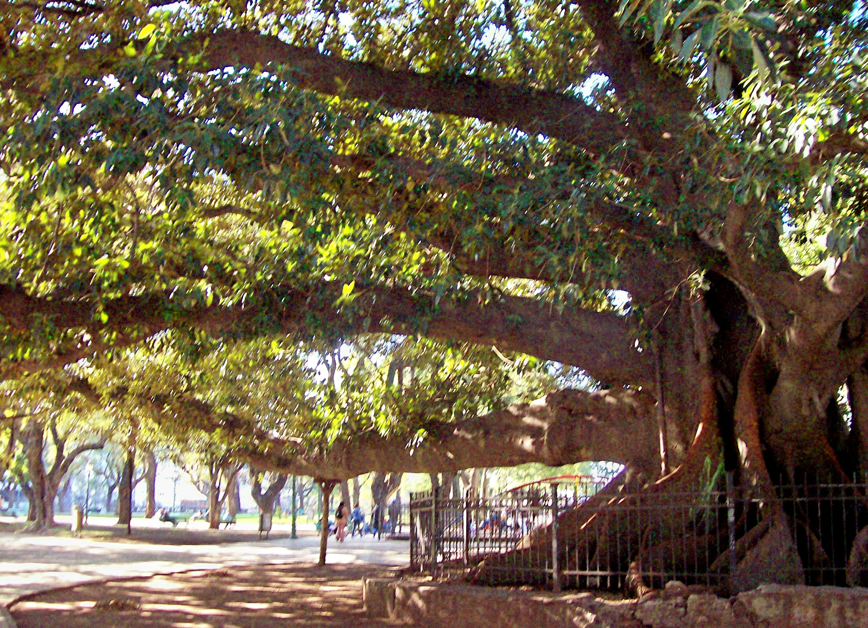 Gomero (Ficus elastica) en la Plaza San Martín, Buenos Aires. Situado en el centro del lado SO de la plaza, a unos 30 m de la intersección de Maipú con Santa Fe. Foto tomada de SO a NE